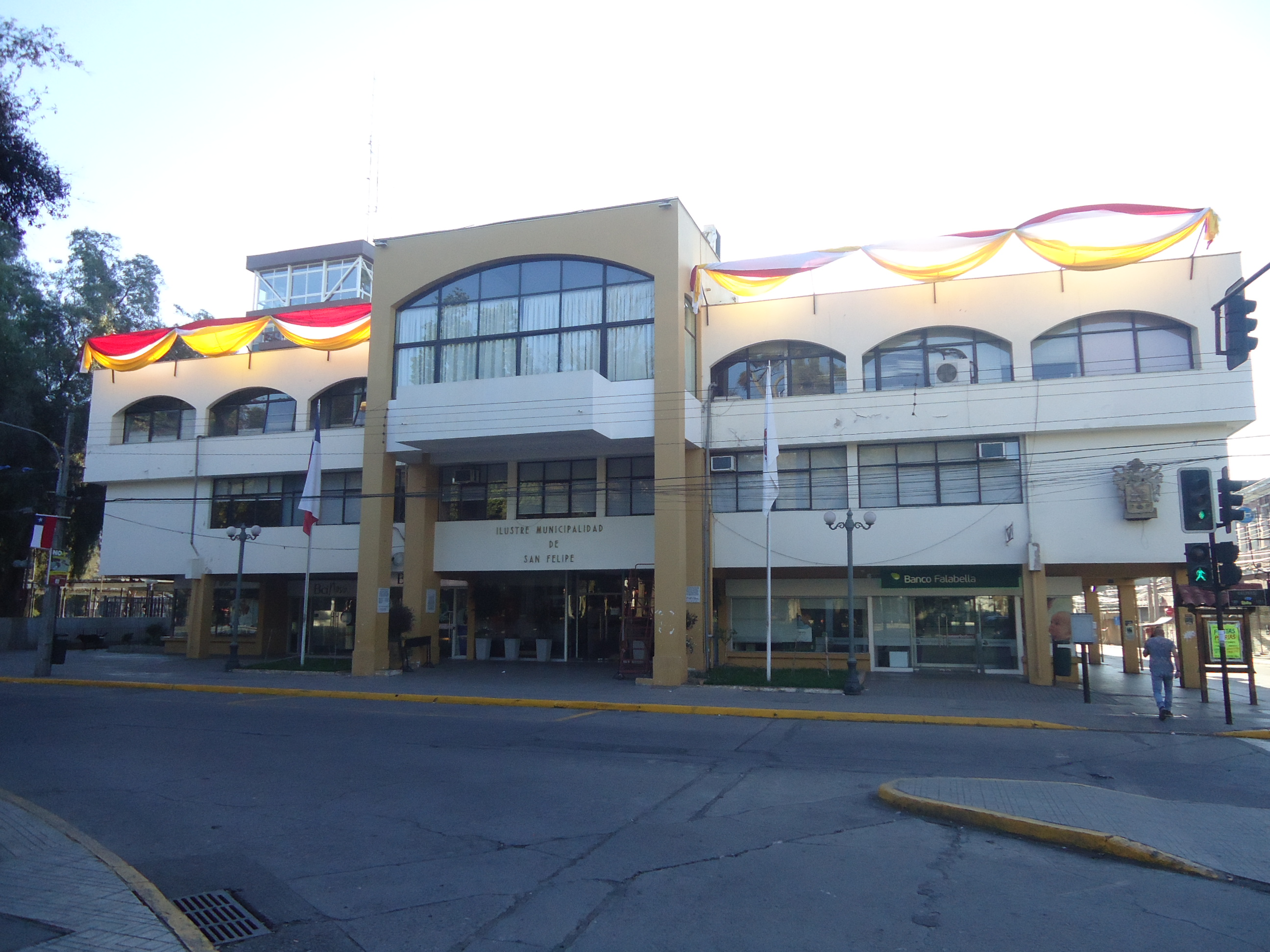 Fachada edificio